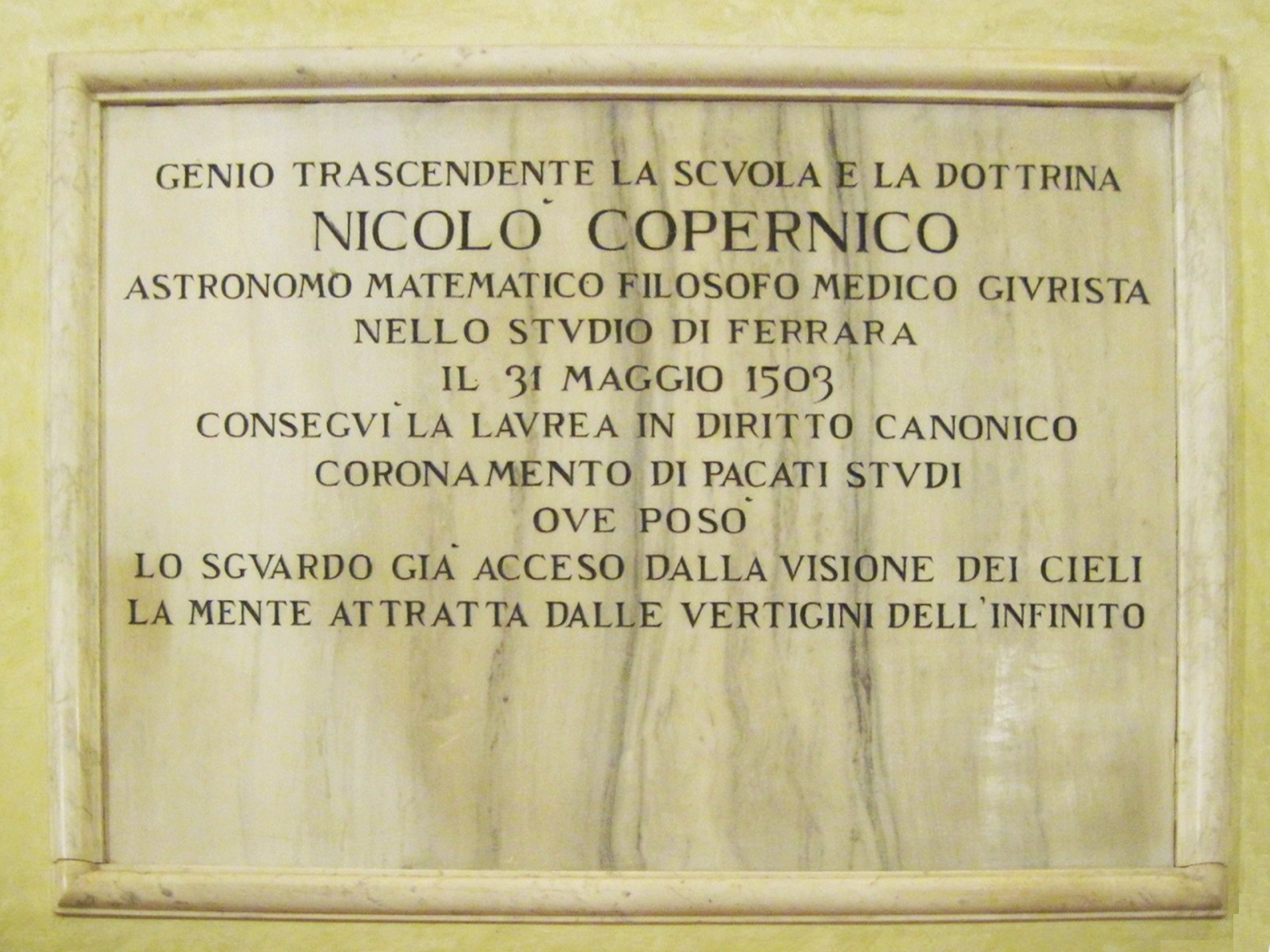 Lapide che ricorda Niccolò Copernico nello scalone d'onore di palazzo Paradiso, a Ferrara, già sede universitaria e di recente sede della biblioteca comunale Ariostea